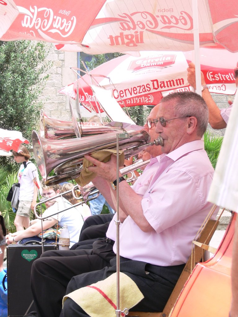 Fiscornaire de la Cobla Popular en una ballada davant de la catedral de Barcelona